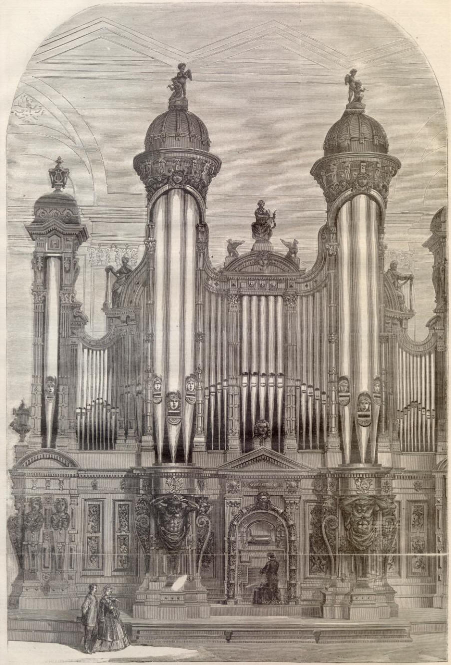 die Orgel der Boston Music Hall mit der Verkleidung von Gustave Herter